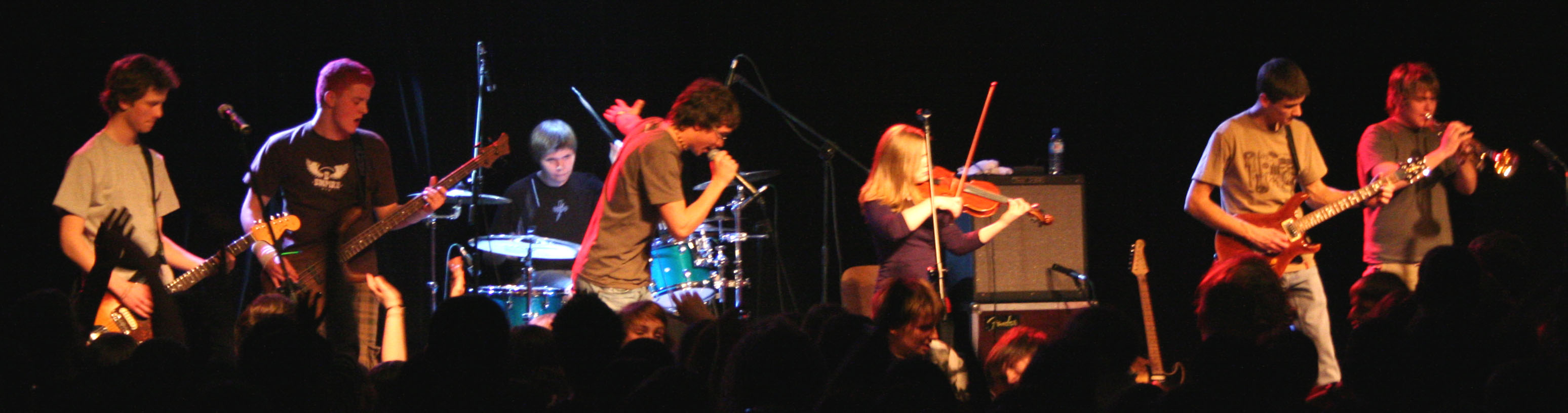 koncert MUTE w "DK Włochy"